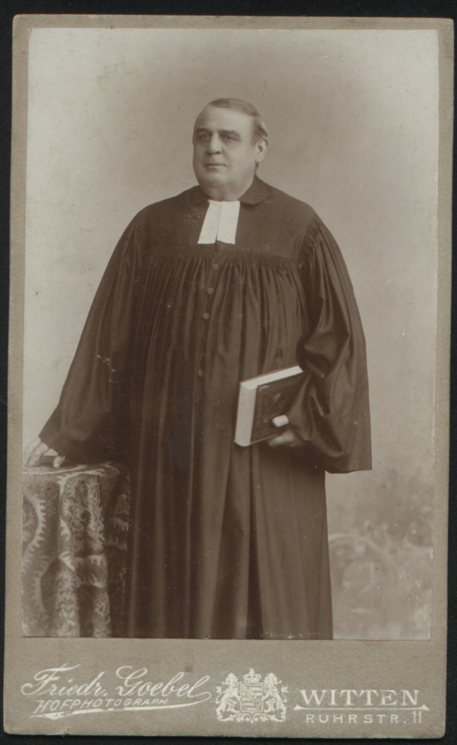 Gründungsvater der Ev. Stiftung Volmarstein